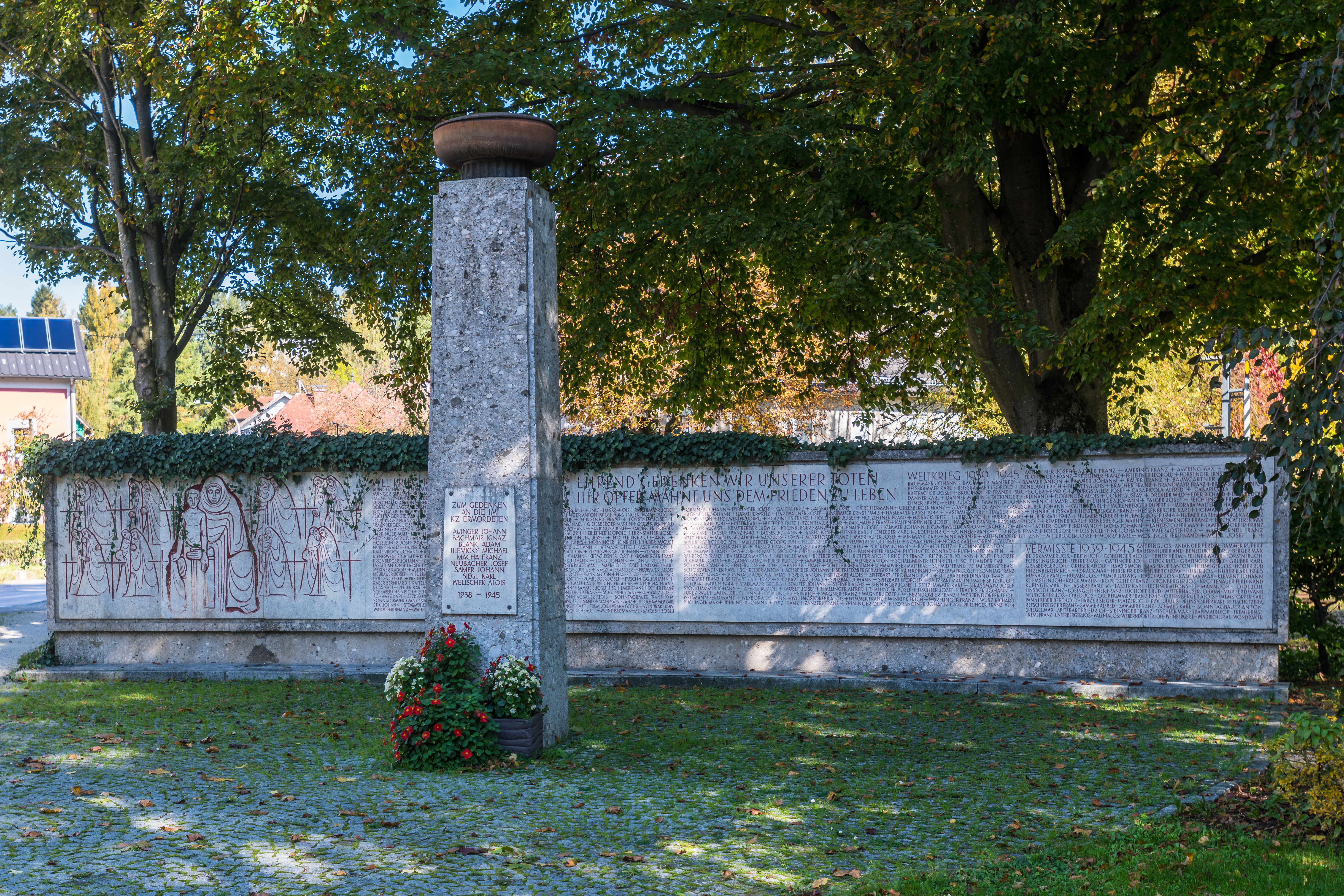 Kriegerdenkmal gegenüber der Pfarrkirche Laakirchen